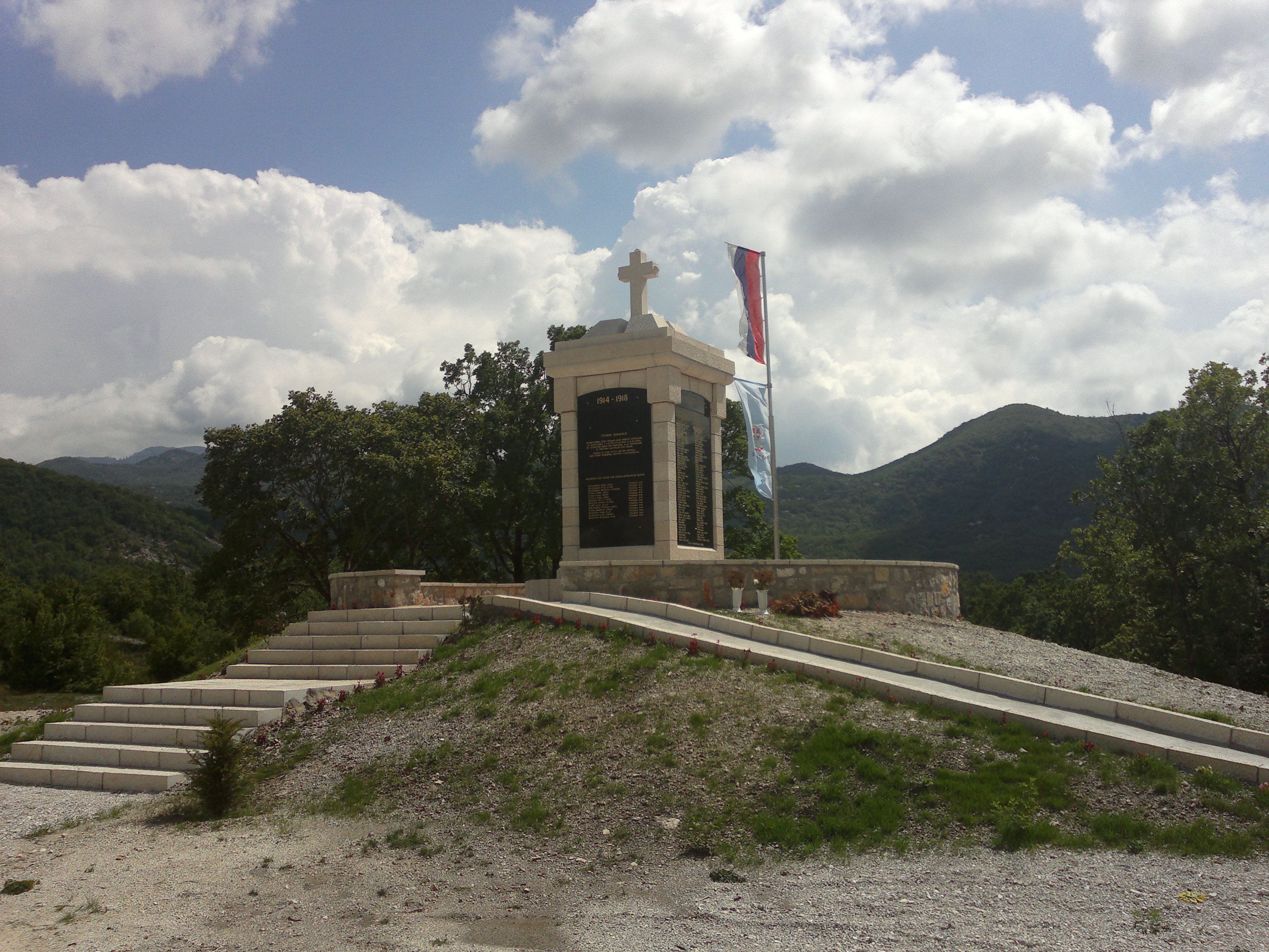 Српски (ћирилица): Оровац - Споменик Први свјетски рат